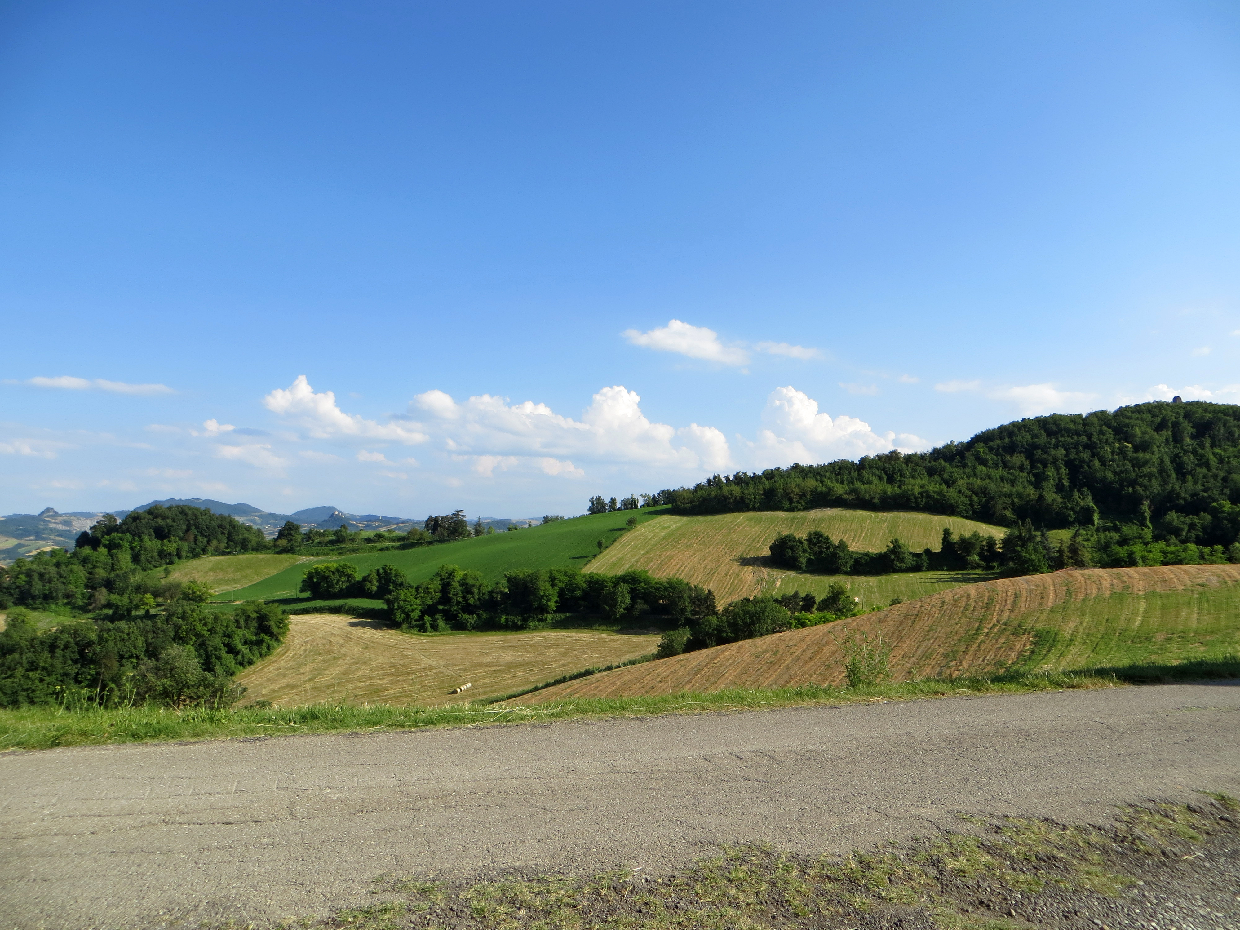 Guardasone (Traversetolo) - panorama sul castello e sulla Guardiola dalla chiesa di San Lorenzo